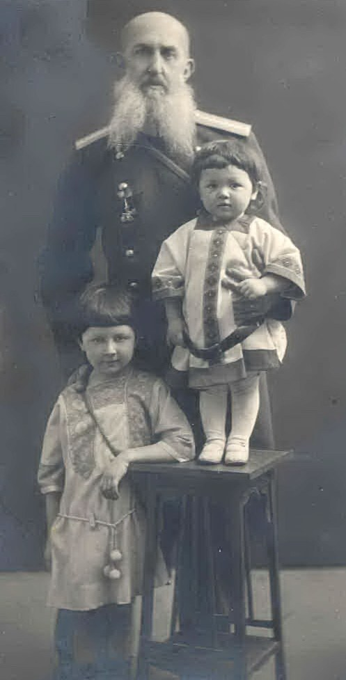 Матвей Степанович Лалаев (1828—1912) — генерал от артиллерии Русской императорской армии, военный педагог и писатель- публицист с внучками.